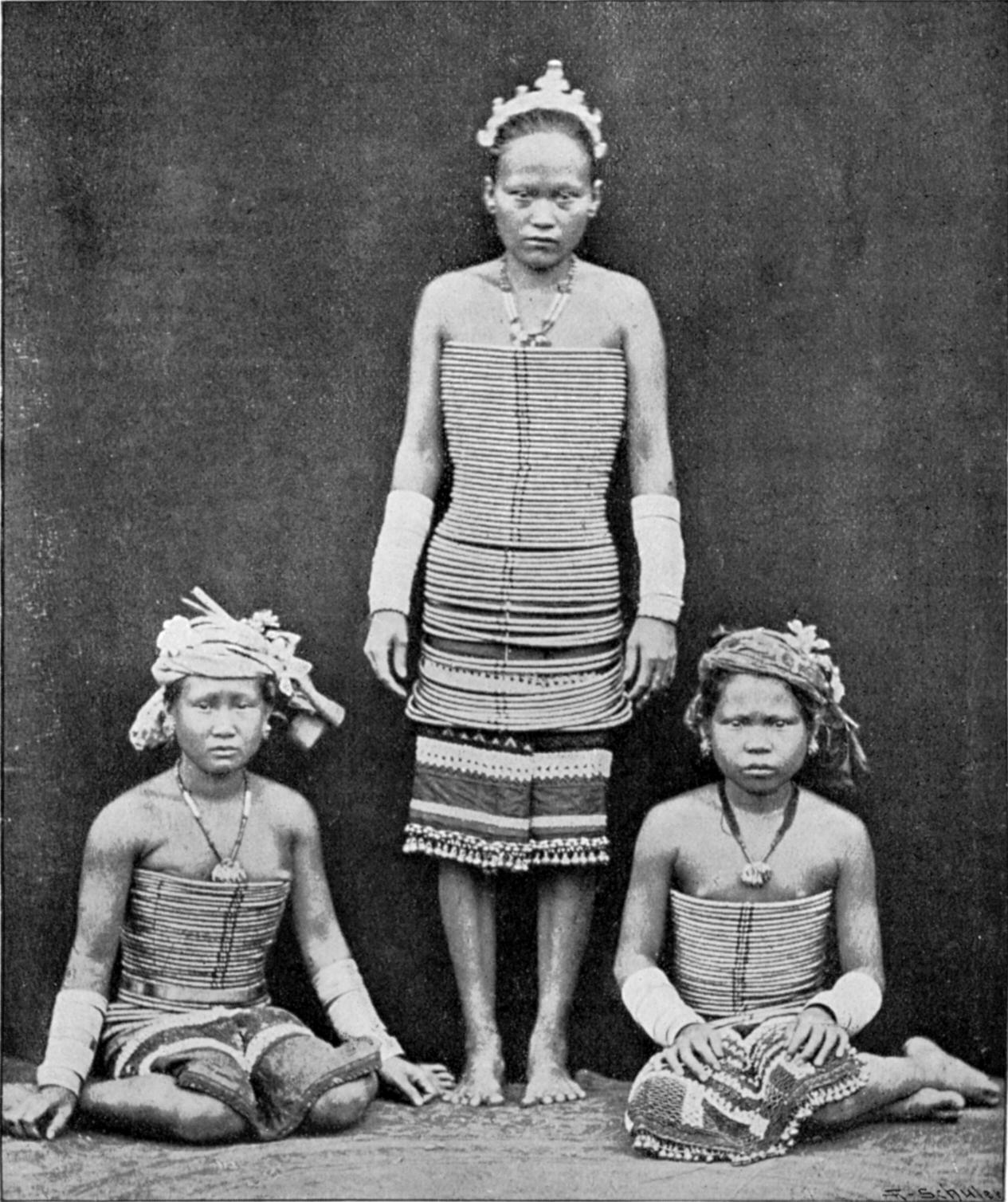 Dayakfrauen aus Borneo (Sammlung Drieszen)